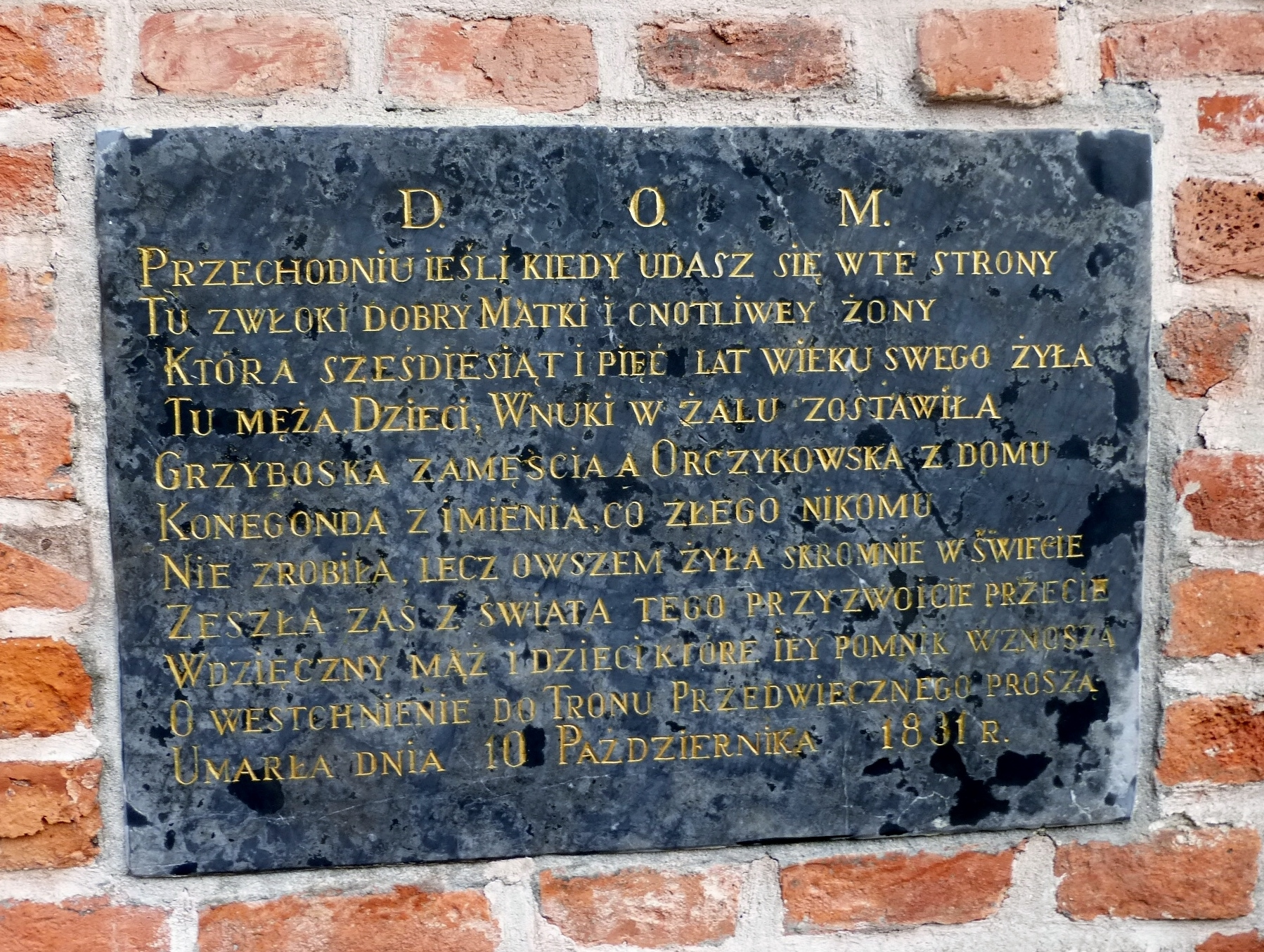 Tablica epitafijna Kunegundy Grzybowskiej z Orczykowskich vel Orczyk (1766-1831) w murze Cmentarza Rakowickiego (pas Lb)